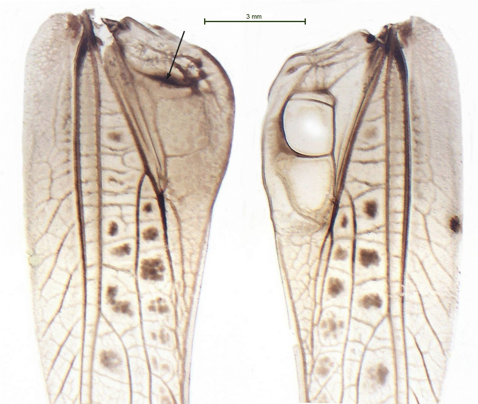 Linker und rechter Vorderflügel eines erwachsenen Männchens. Der Pfeil zeigt auf die aktive Schrillleiste, die sich auf dem linken Flügel befindet und ein Teil der Schrillader ist. Auf dem rechten Flügel ist dagegen der Spiegel vorzüglich ausgebildet.